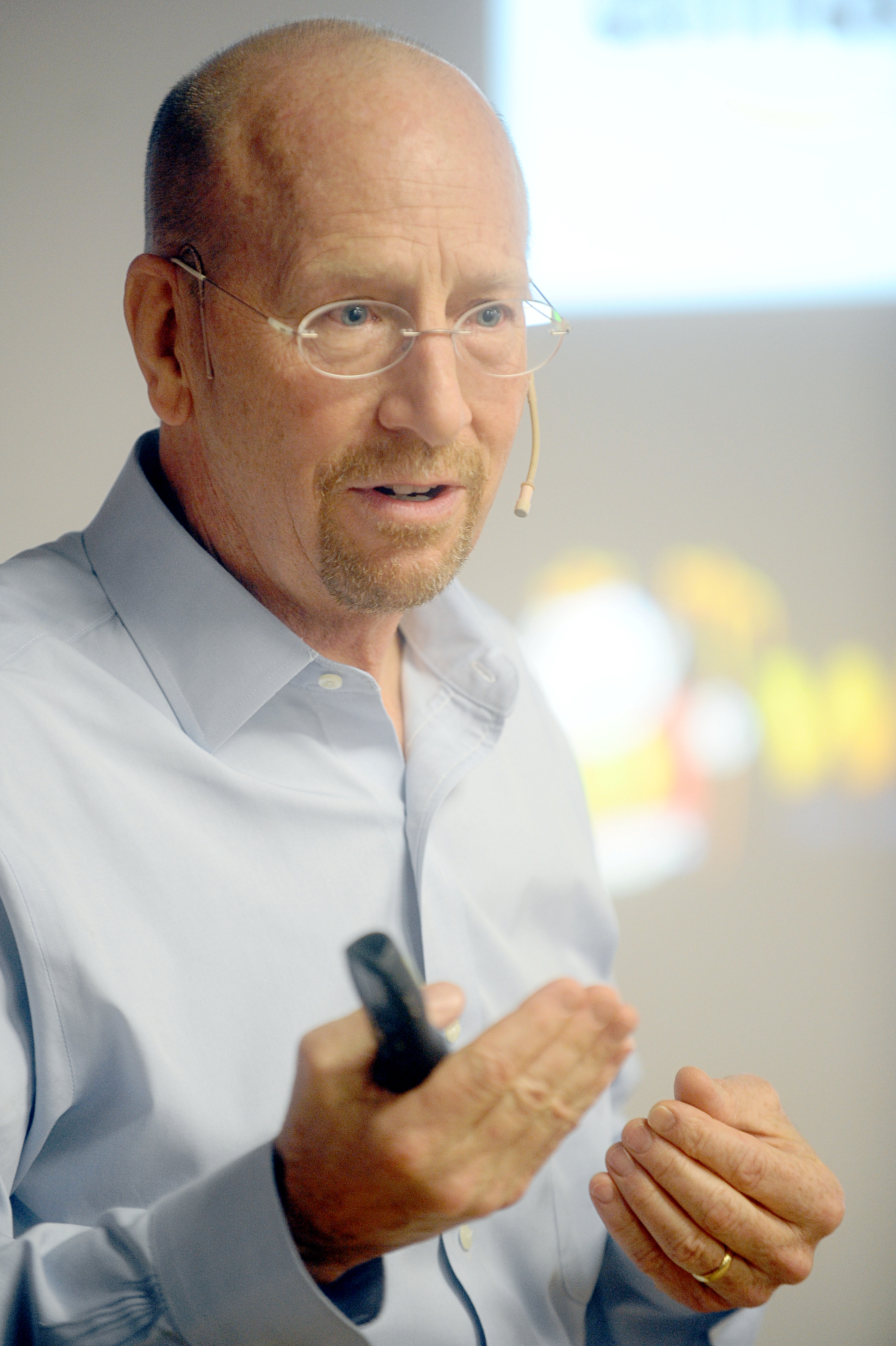 Richard Baldwin al Festival dell'Economia di Trento